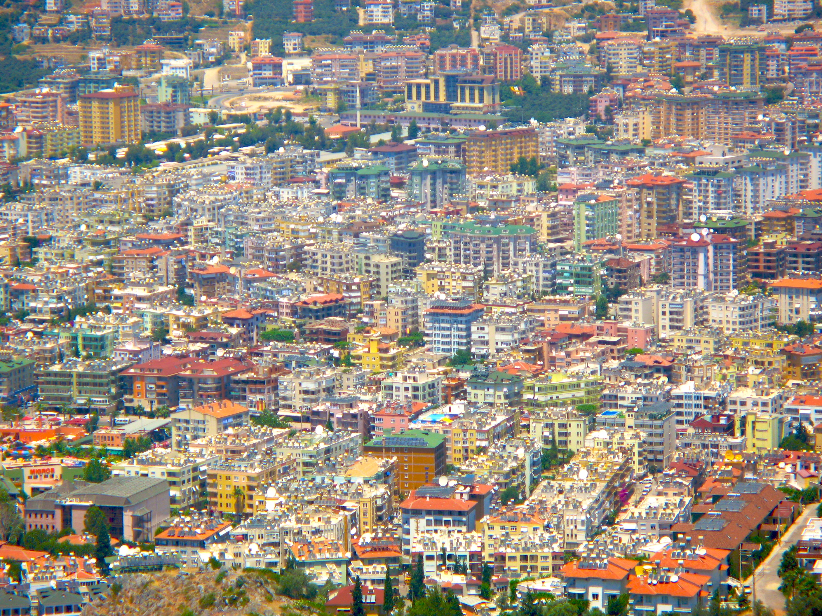 Alanya kesklinn